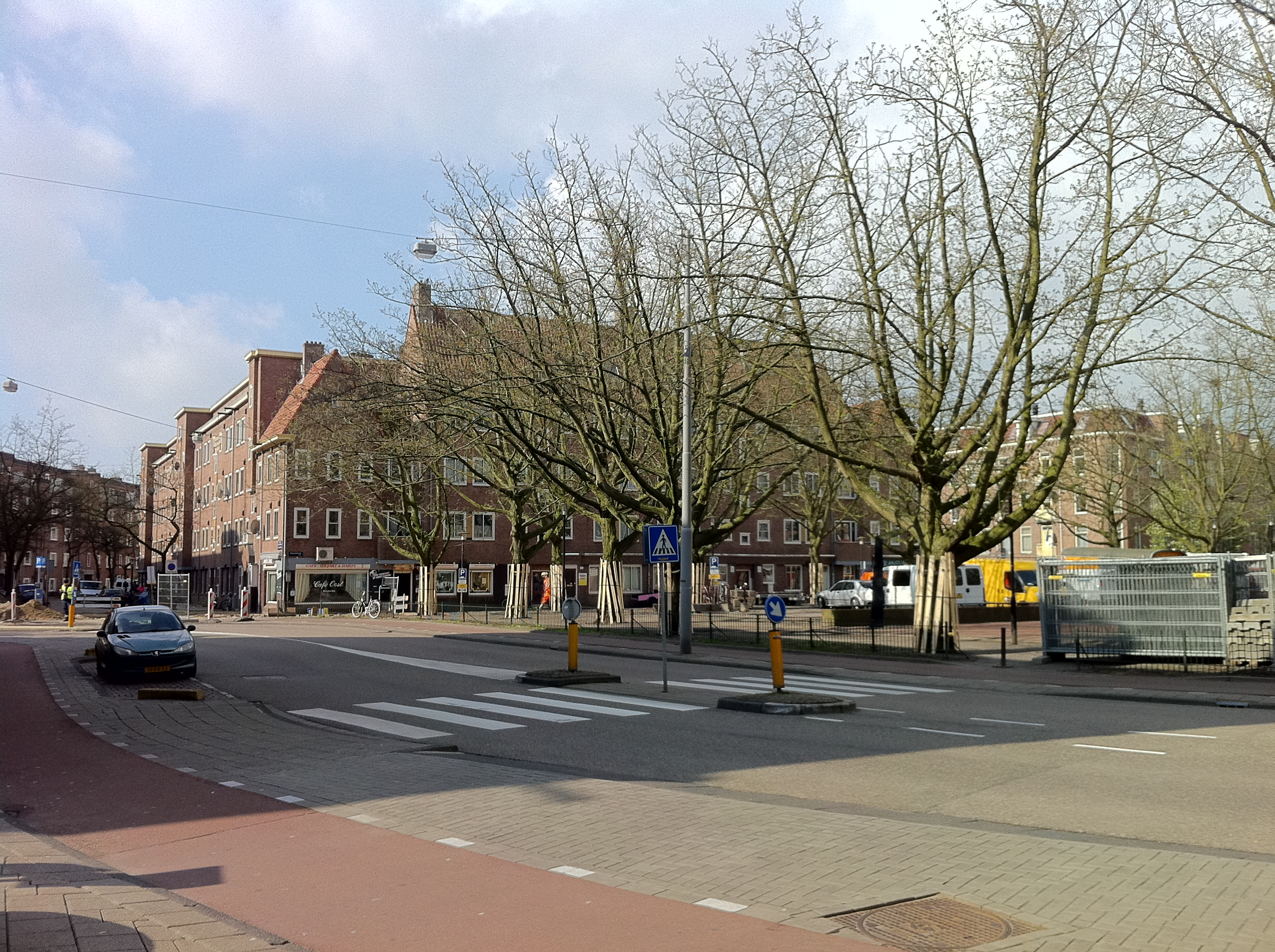 Amsterdam - Krugerplein